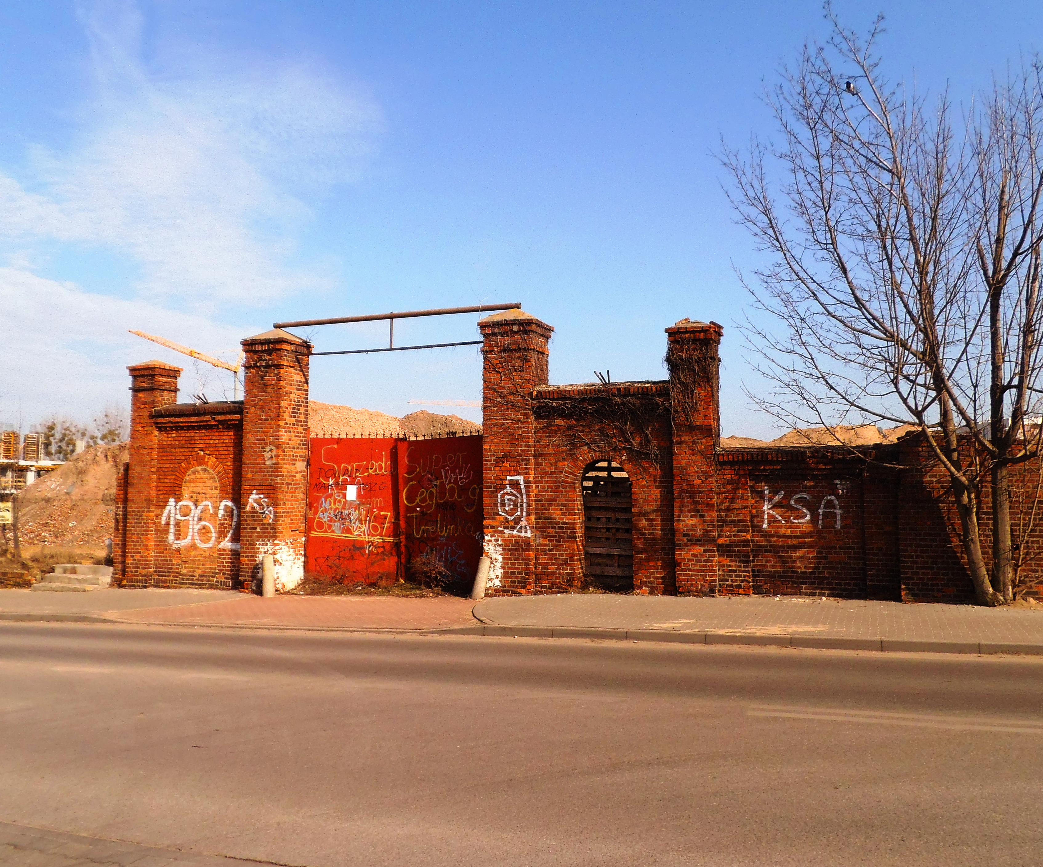 Brama Tormięsu w Toruniu